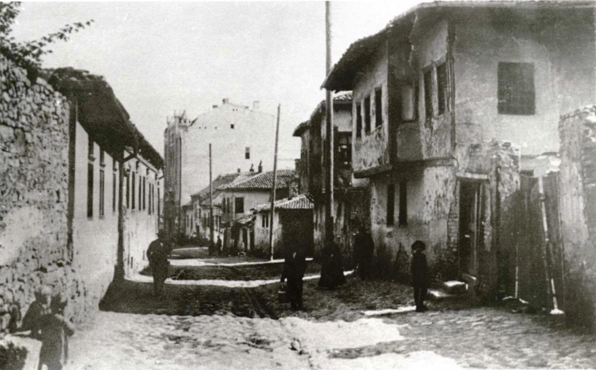 בתי השכונה היהודית יאלייה בבלגרד